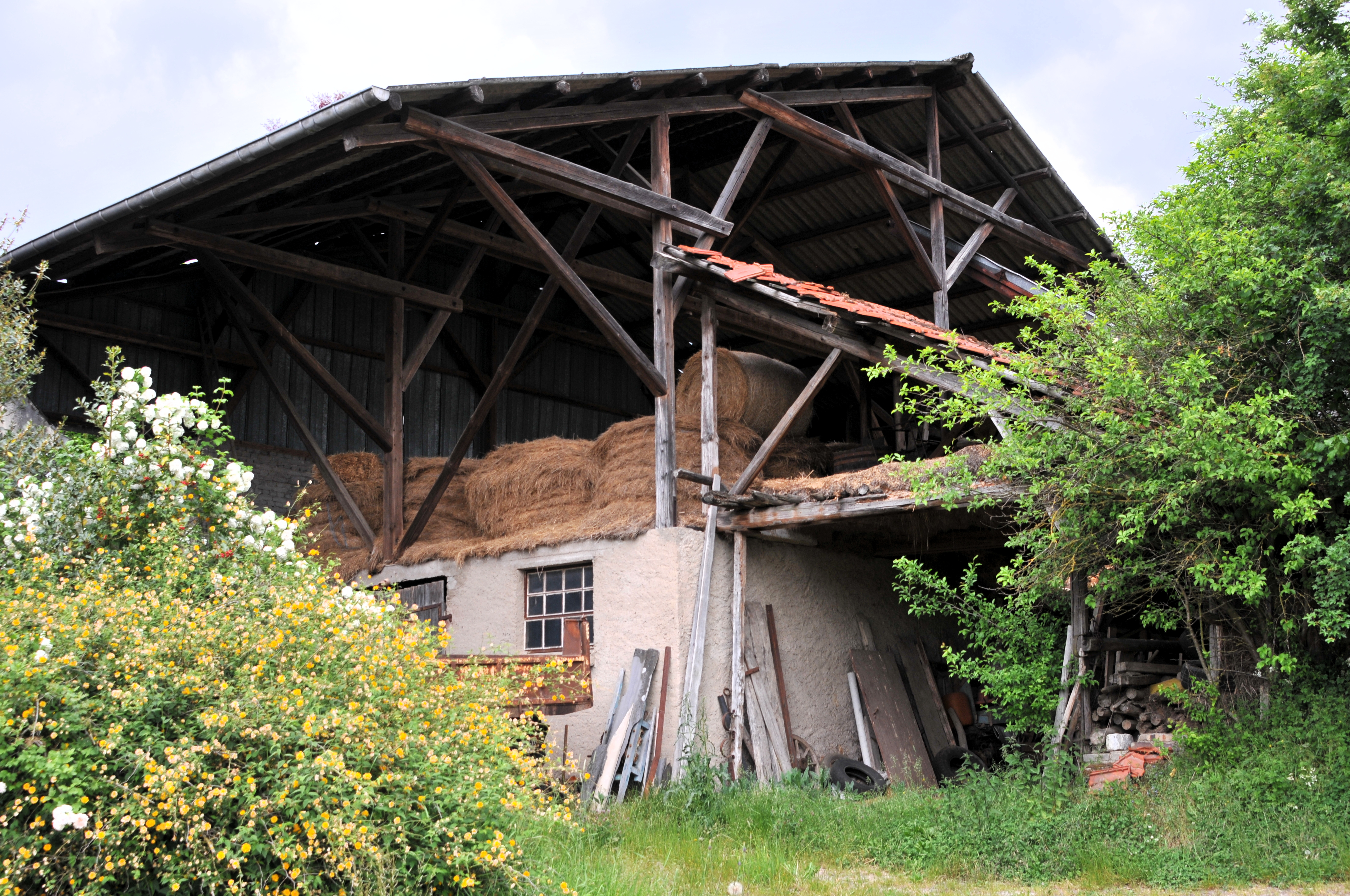 Scheier an der Iechternacherstrooss zu Manternach.